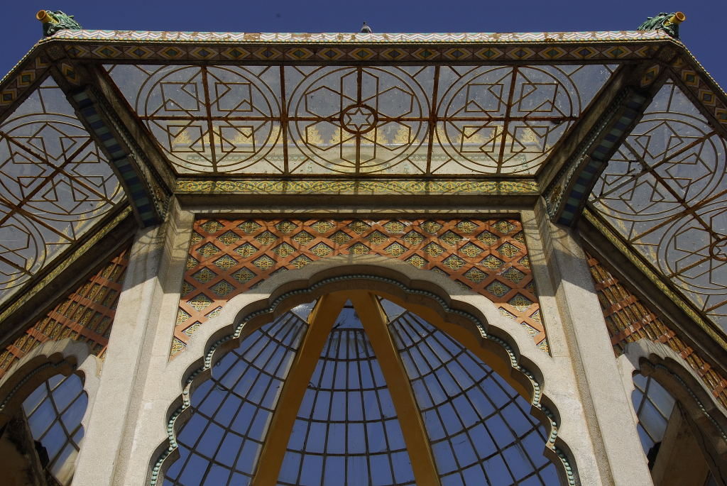 Caltagirone, ITA